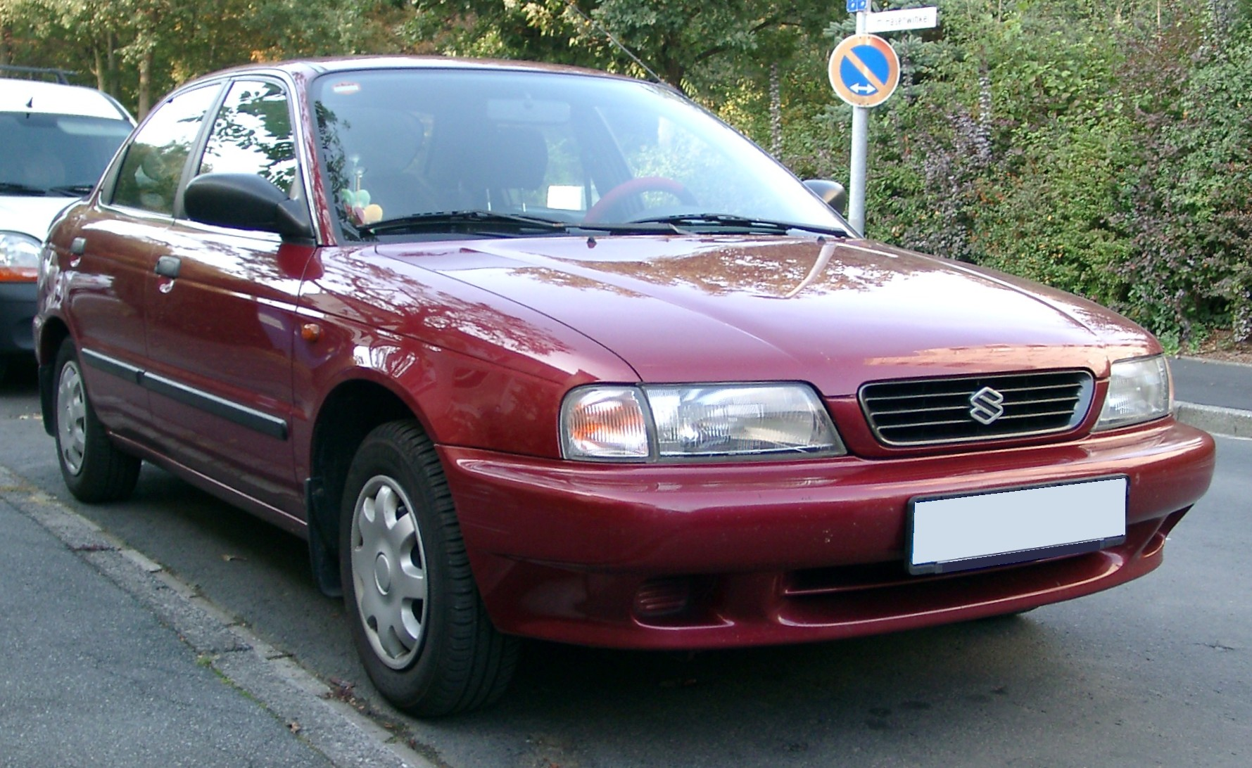 Suzuki Baleno